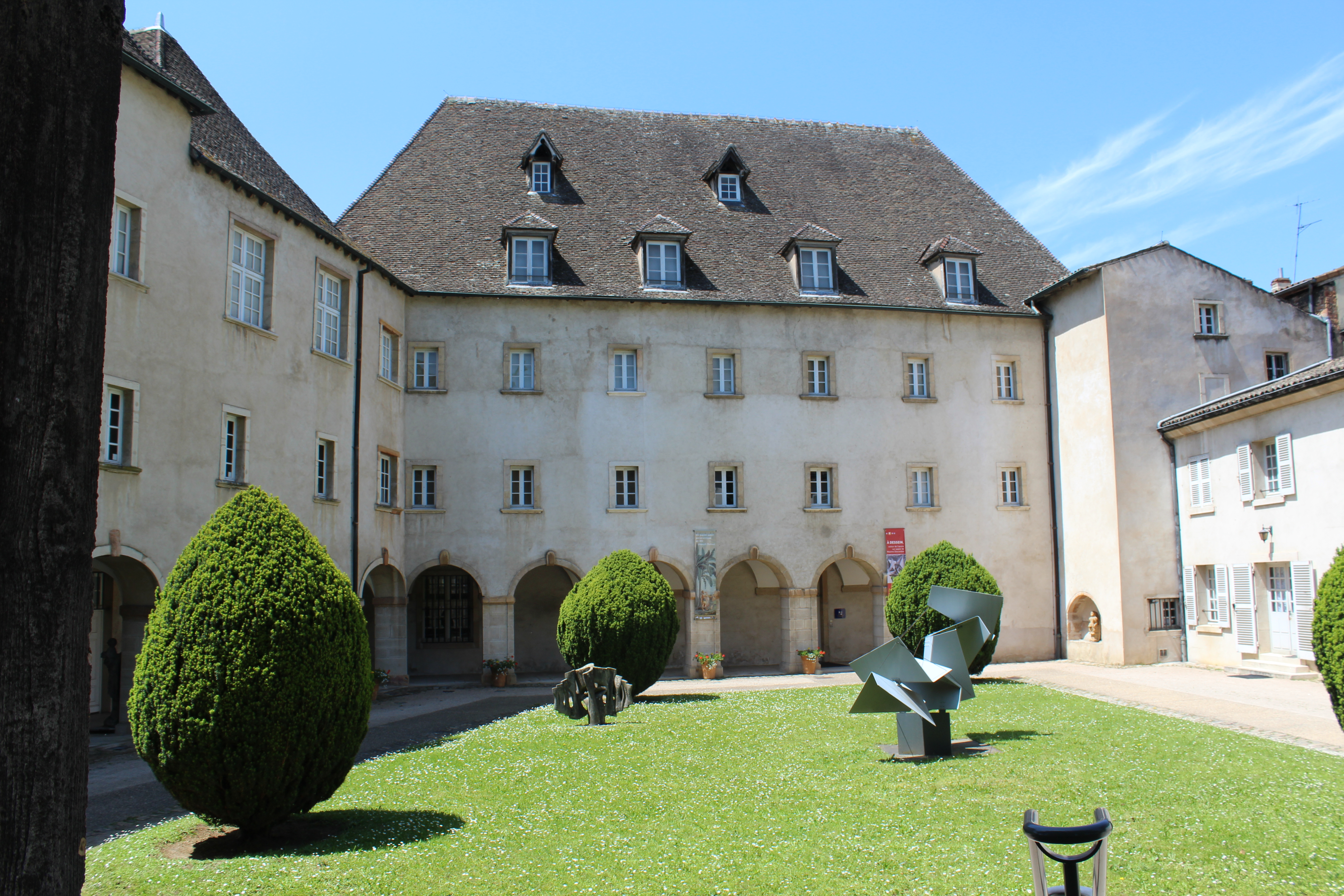 Le musée des Ursulines à Mâcon.